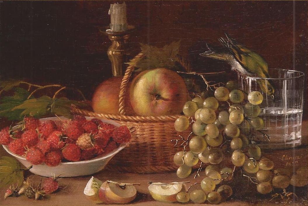 Изображение натюрморта художника И.Ф. Хруцкого (1810-1885) "Плоды и птичка" (1833). Находится в Национальном Художественном музее Беларуси.